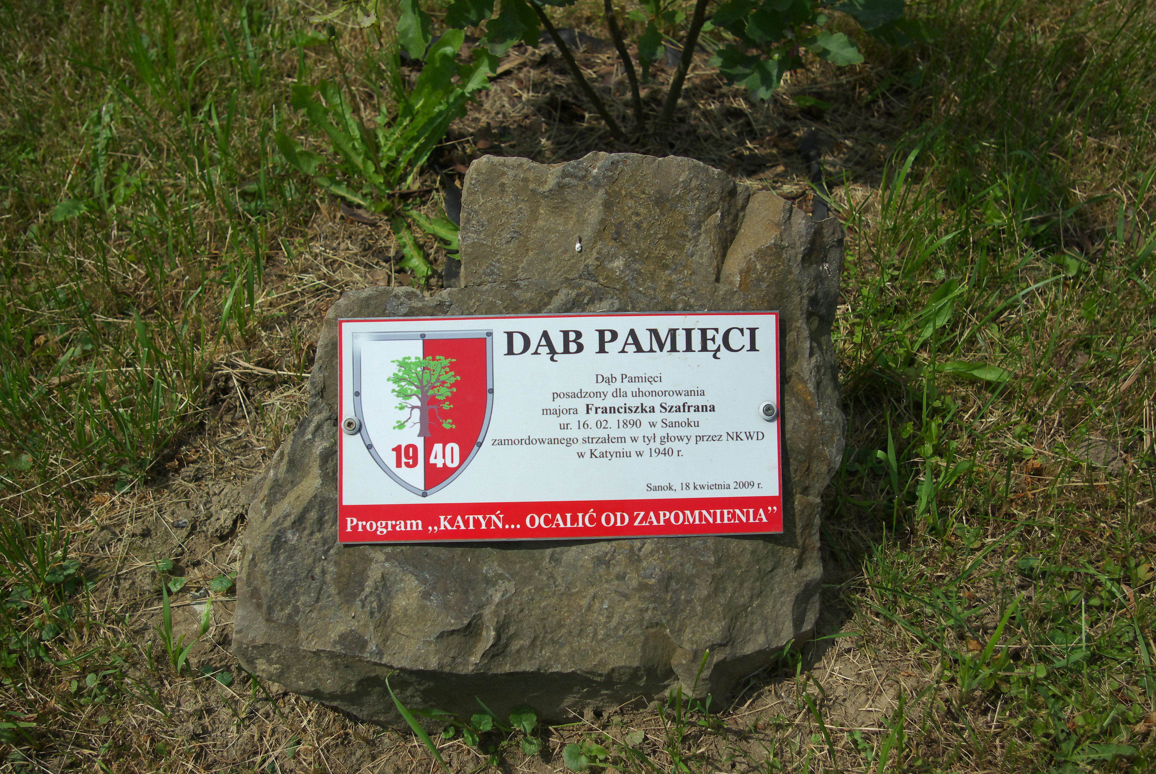 Dąb Pamięci Franciszka Szafrana w ramach Pomnika Golgota Wschodu na Cmentarzu Centralnym w Sanoku.